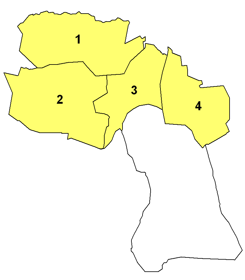 Landkarte der Niedergrafschaft der Grafschaft Bentheim